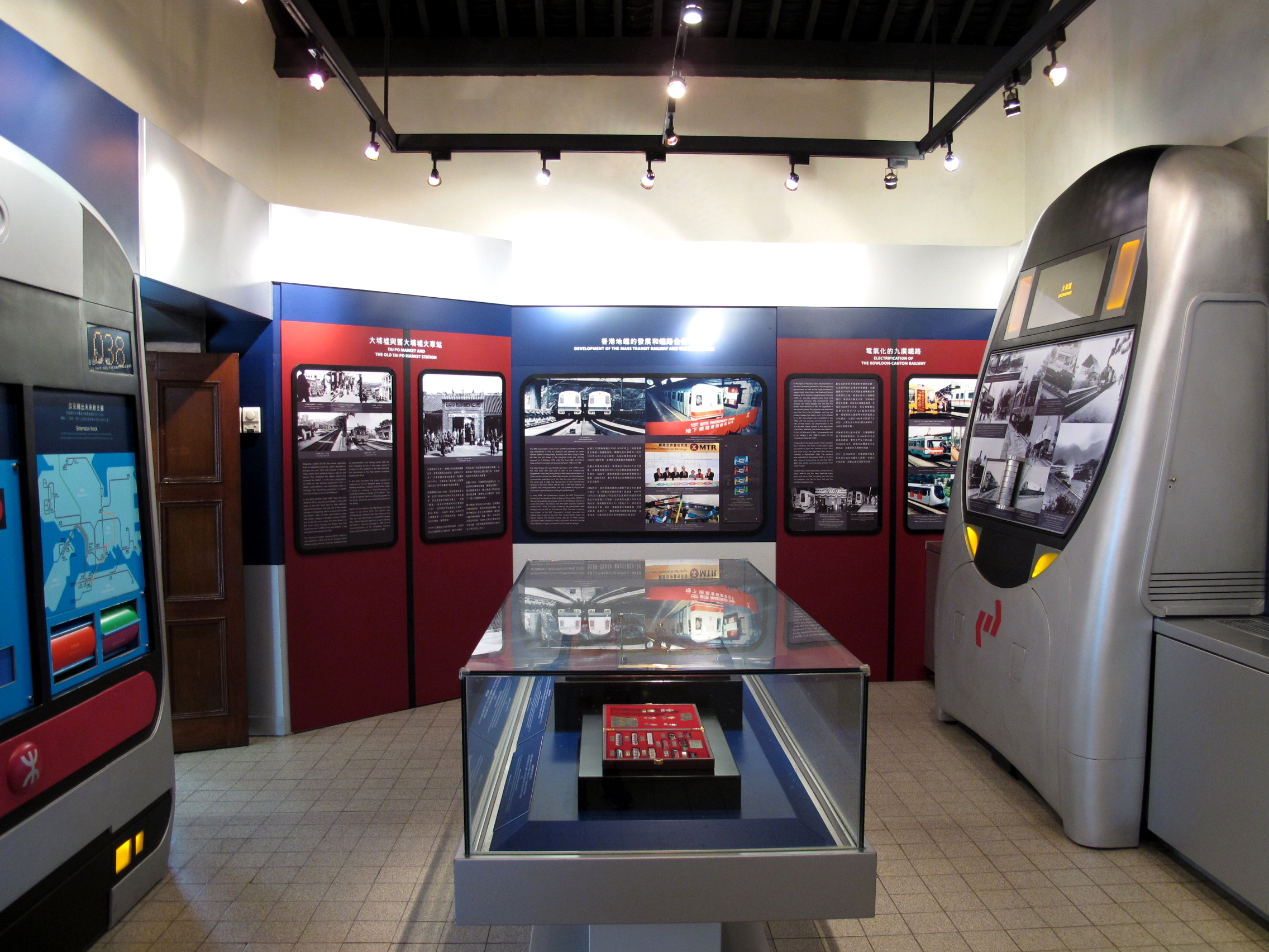 Hong Kong Railway Museum Exhibit